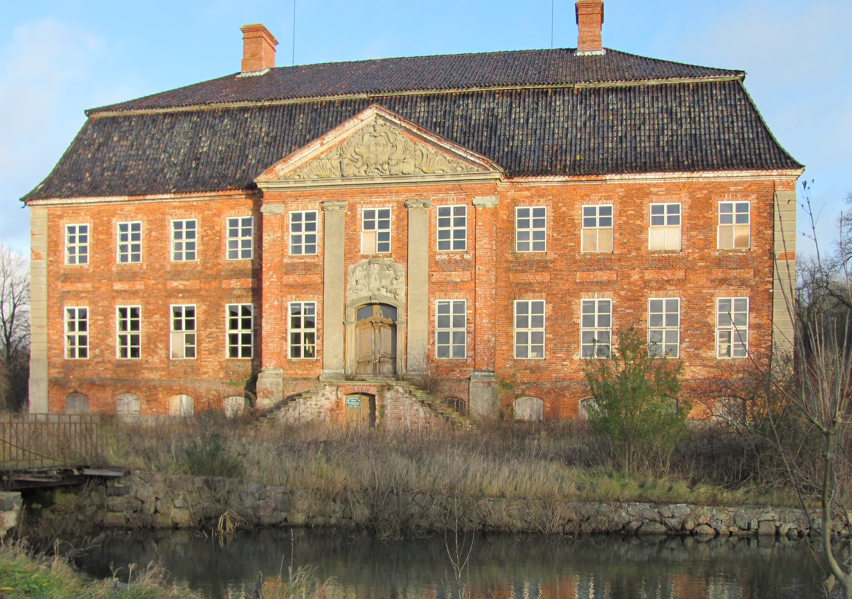 Schloss Johannstorf, Dassow